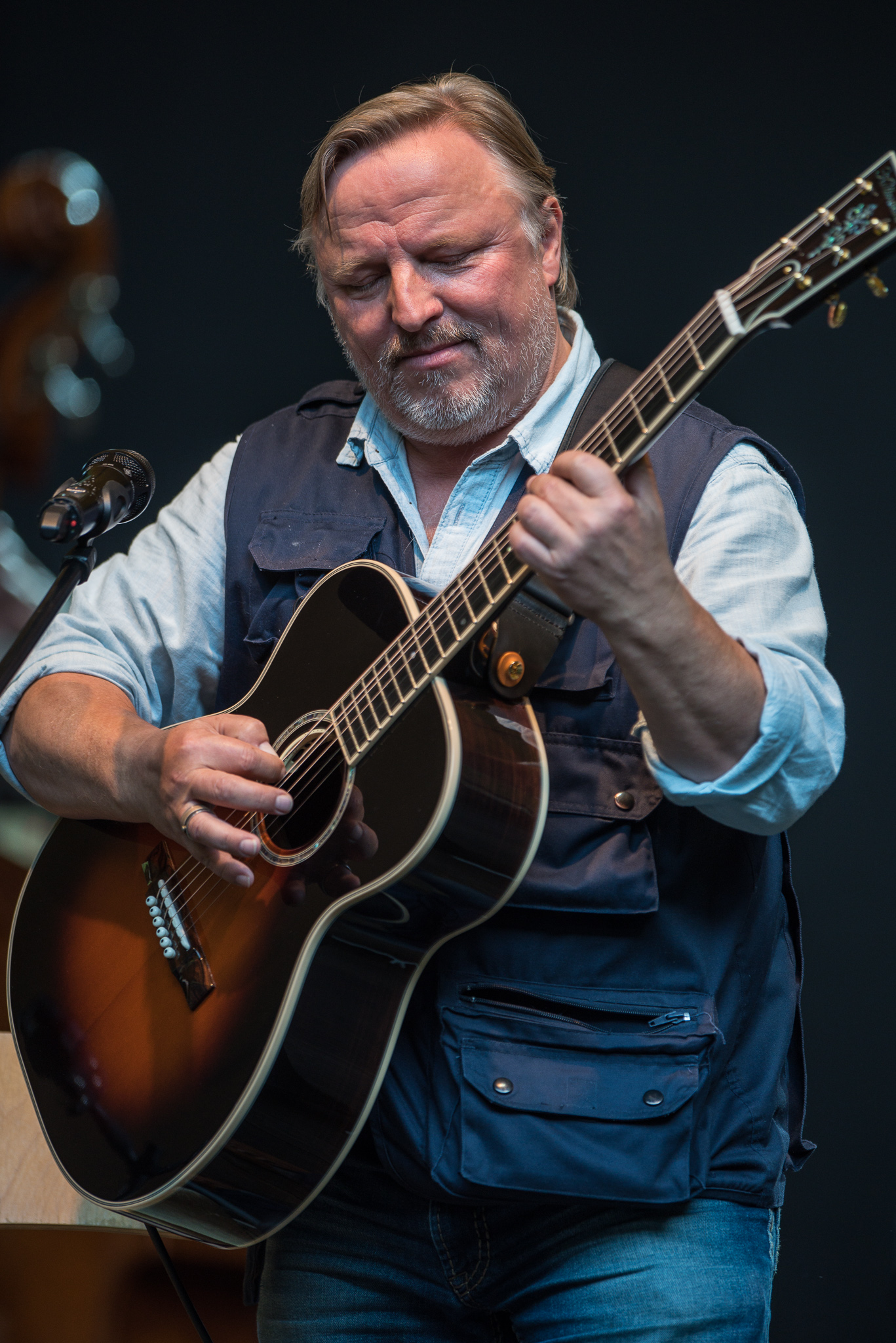 Axel Prahl & Das Inselorchester,Concertbüro Franken,Konzert,Livekonzert,Livemusik,Musik,Serenadenhof